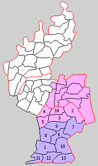 福岡県三池郡の町村制時点の町村。